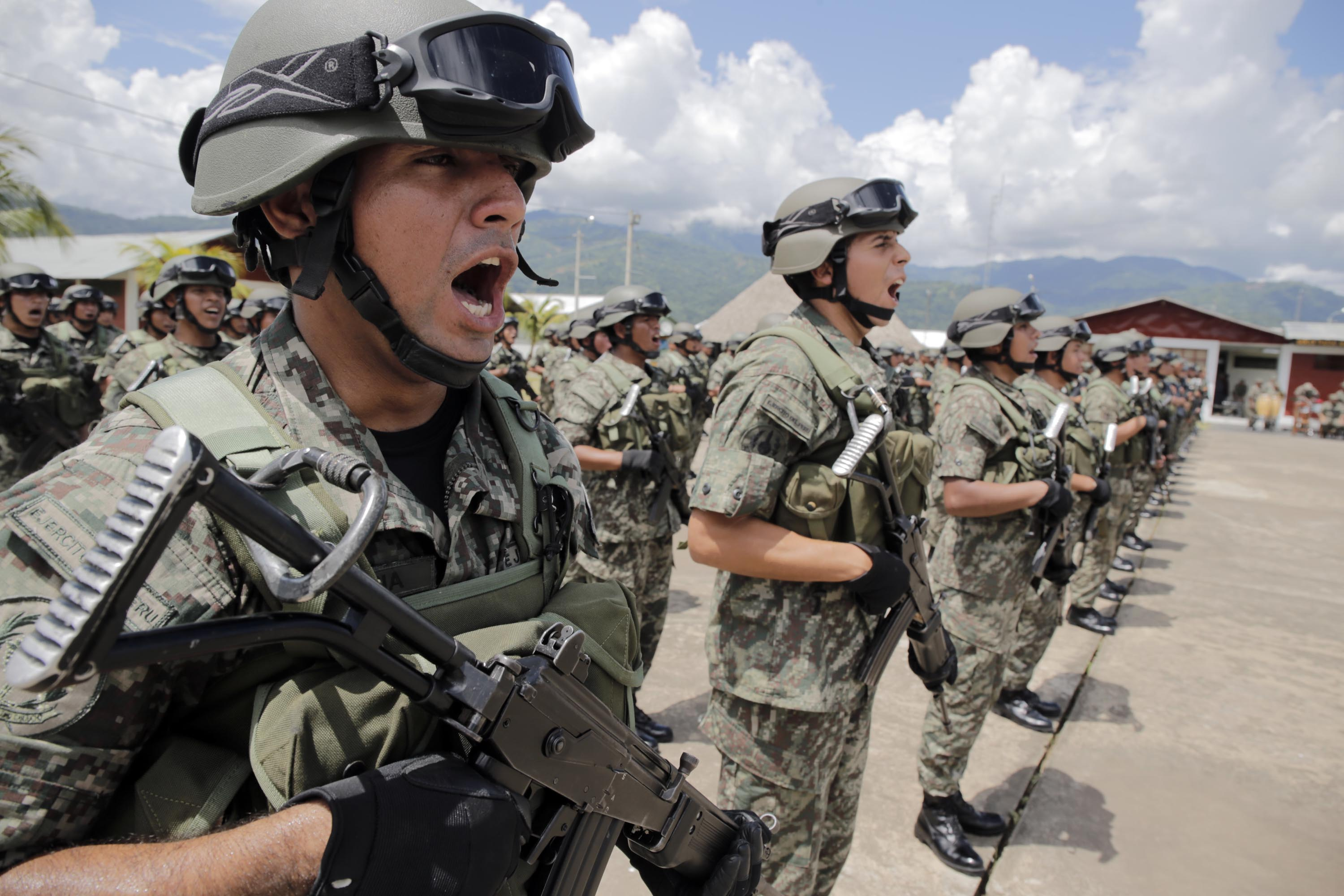 En vísperas de la Nochebuena, el ministro de Defensa, Pedro Cateriano Bellido, visitó a los soldados que defienden a la Patria en el Valle de los Ríos Apurímac, Ene y Mantaro (VRAEM) y les llevó el saludo del gobierno por la sacrificada labor que realizan, alejados de sus familias en estas fechas especiales. El titular del sector, acompañado del Jefe del Comando Conjunto de las Fuerzas Armadas, almirante José Cueto, y de los comandantes generales del Ejército, Marina de Guerra y Fuerza Aérea, llegó al Fuerte Pichari del Comando Especial VRAEM en la región Cusco y departió con la tropa y oficiales destacados ahí “El gobierno les agradece el esfuerzo que ponen en la defensa de la integridad y soberanía de la Patria, y por la sacrificada labor para enfrentar al narcotráfico y al terrorismo”, dijo el ministro al dirigirse al contingente y les entregó panetones y mochilas. Reiteró la decisión del gobierno del Presidente Ollanta Humala de modernizar las bases contraterroristas y dotarlas de recursos, con la finalidad de que el personal militar pueda desempeñarse en las mejores condiciones. Mencionó, en este sentido, la reciente adquisición de 24 helicópteros rusos que apoyarán las labores en el VRAEM. Asimismo, recordó que el gobierno asumió el compromiso de mejorar los sueldos en las Fuerzas Armadas y Policía Nacional, y que tras años de postergación, este mes sus integrantes recibirán el segundo tramo de los aumentos, como parte de la reforma remunerativa y pensionaria. “Les transmito el saludo del Presidente Ollanta Humala, como Jefe Supremo de las Fuerzas Armadas, y les reitero el agradecimiento de la Nación por su labor en defensa de la paz”, señaló el ministro Cateriano. Finalmente, acompañado del general EP Raymundo Flores Cárdenas, comandante general del Comando Especial-VRAEM, recorrió los ambientes renovados del Fuerte Pichari y comprobó las condiciones óptimas en que cumplen su misión nuestros combatientes.